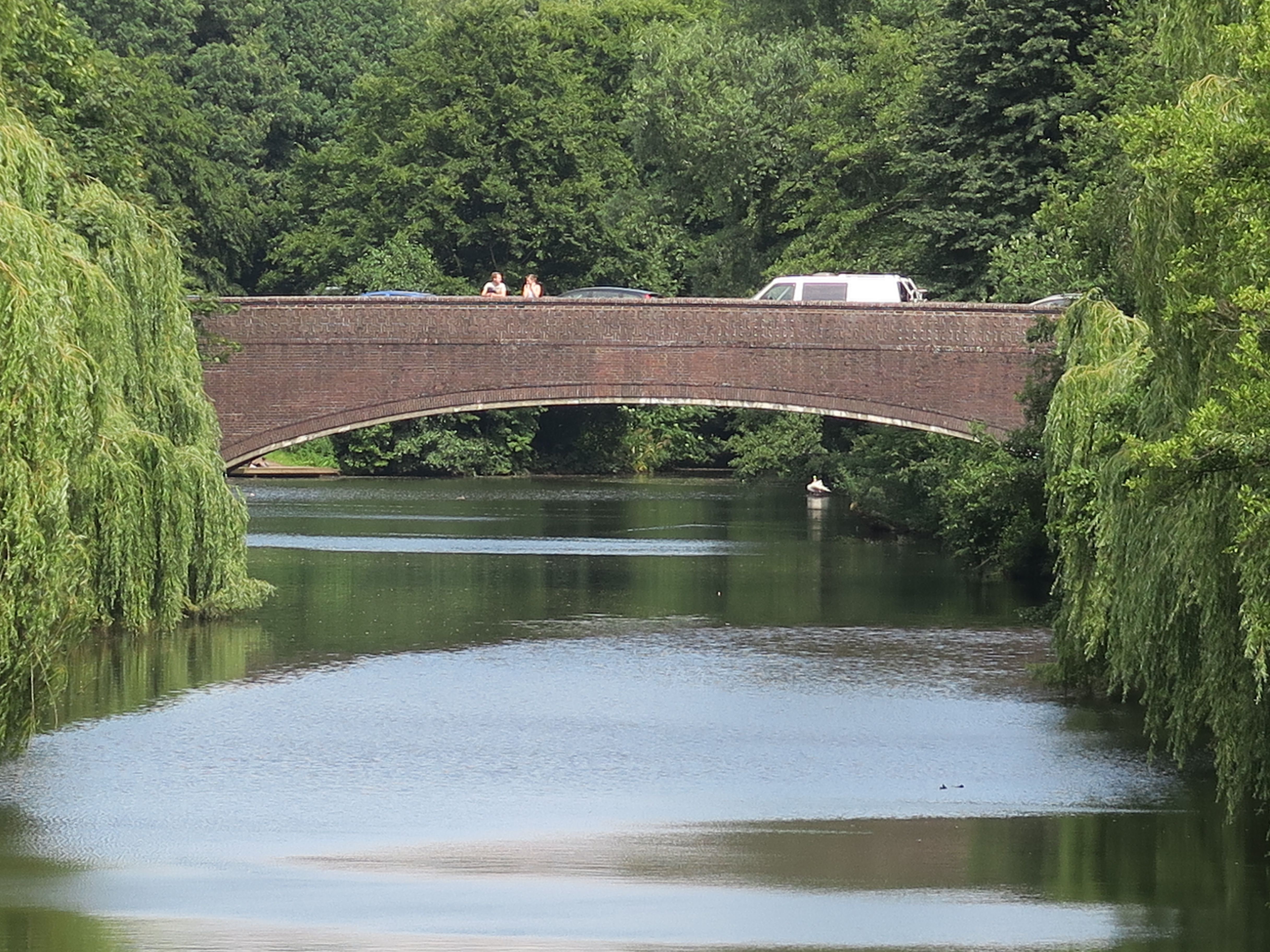 Westseite der Von-Essen-Straße-Brücke in Hamburg